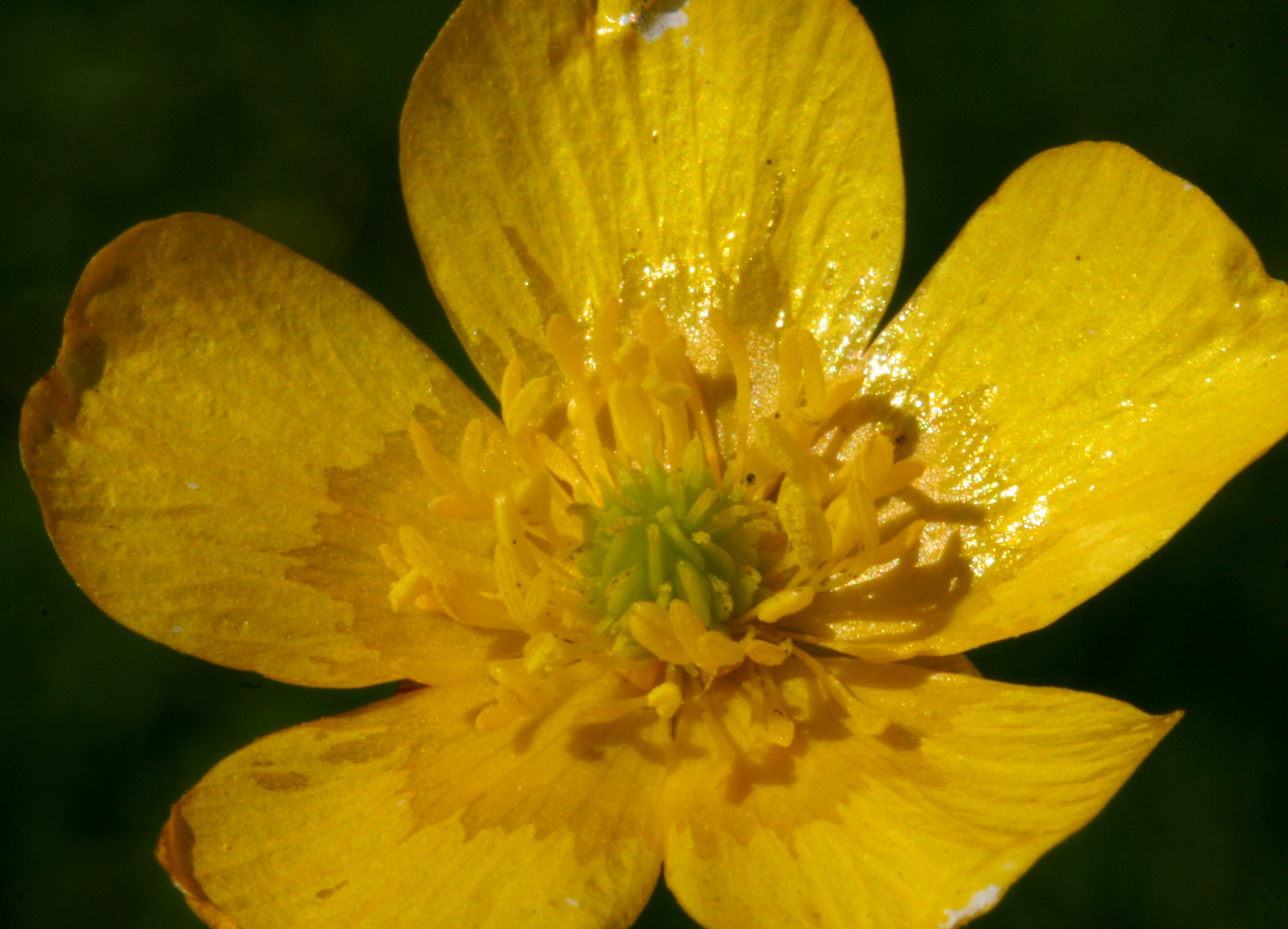 Ranuncolo comune - Località: Villa Prima, Limana (BL), 350 m s.l.m.